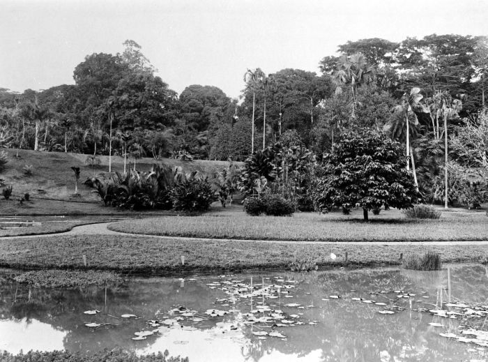 Negatief. 's Lands Plantentuin in Buitenzorg